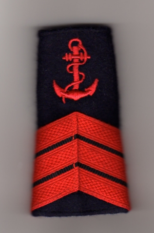 Photographie d'un manchon de grade d'un quartier-maître de première classe.